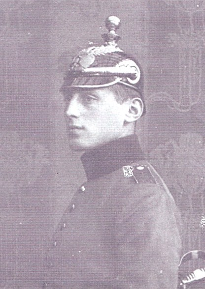 Richard Koch (1882–1949), Medizinhistoriker u. -theoretiker, als Einjährig-Freiwilliger in Karlsruhe (1906)